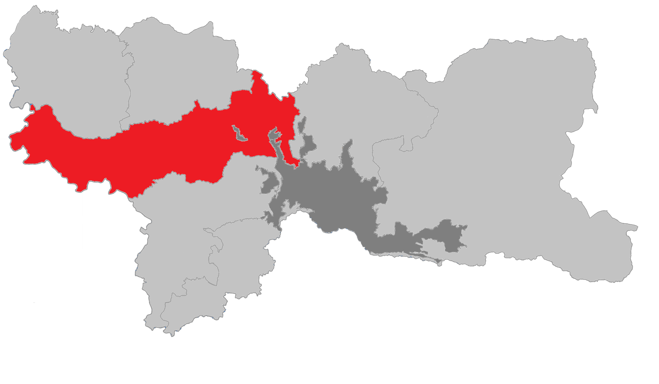 corregimiento de Manizales